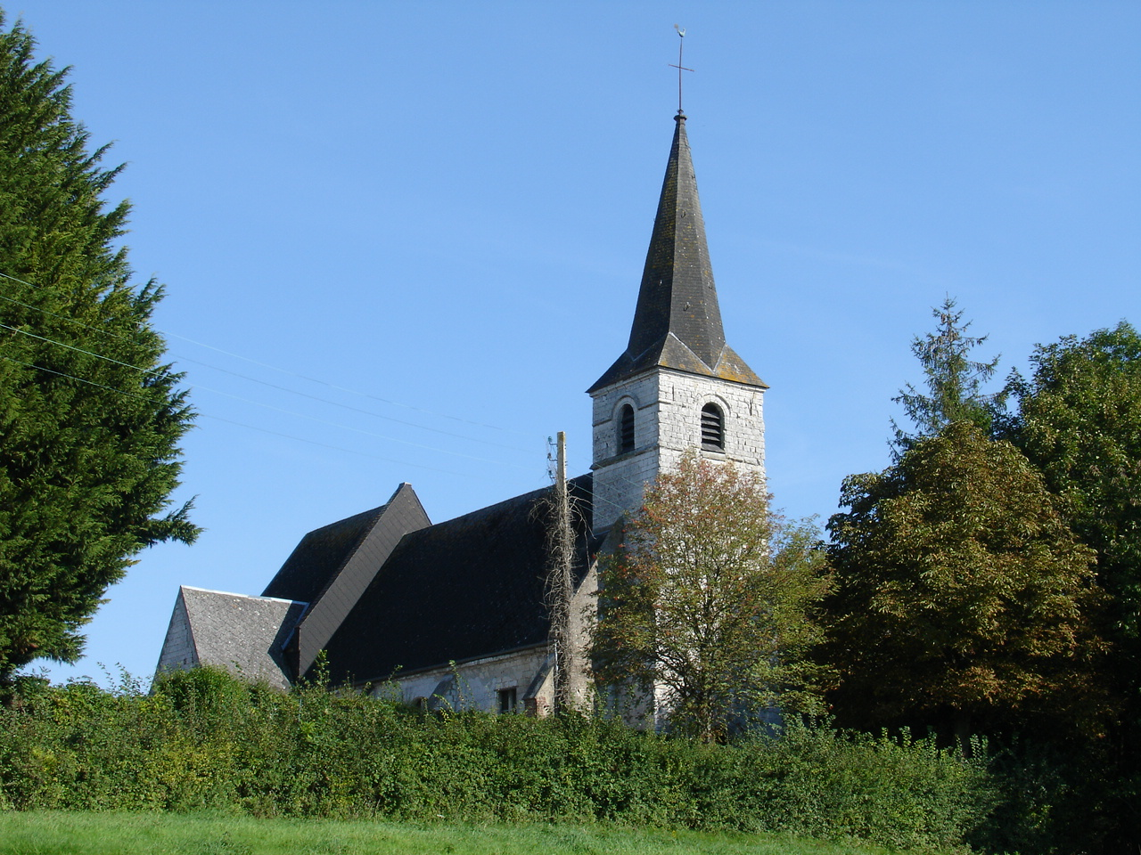 Église de Cavron-Saint-Martin